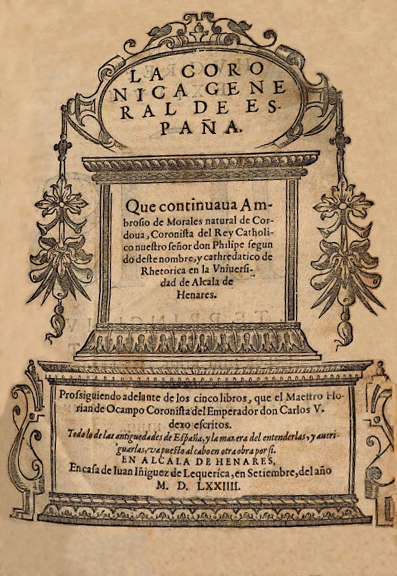 Portada del libro La Crónica general de España. Publicado por Ambrosio de Morales, en Alcalá de Henares, en 1574.